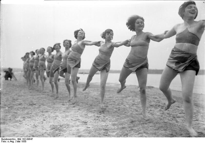 Die brühmte Laban-Tanzschule trainiert! Nach den modernsten Unterrichstmethoden werden die zukünftigen Tanzstars in der Labanschule ausgebildet. Unsere Bilder zeigen eine Morgenübung der berühmten Tanzschule Laban im Strandbad Wannsee bei Berlin. Im rythmischen Lauf bewegen sich die Tänzerinnen der Labanschule am Strande in Wannsee.